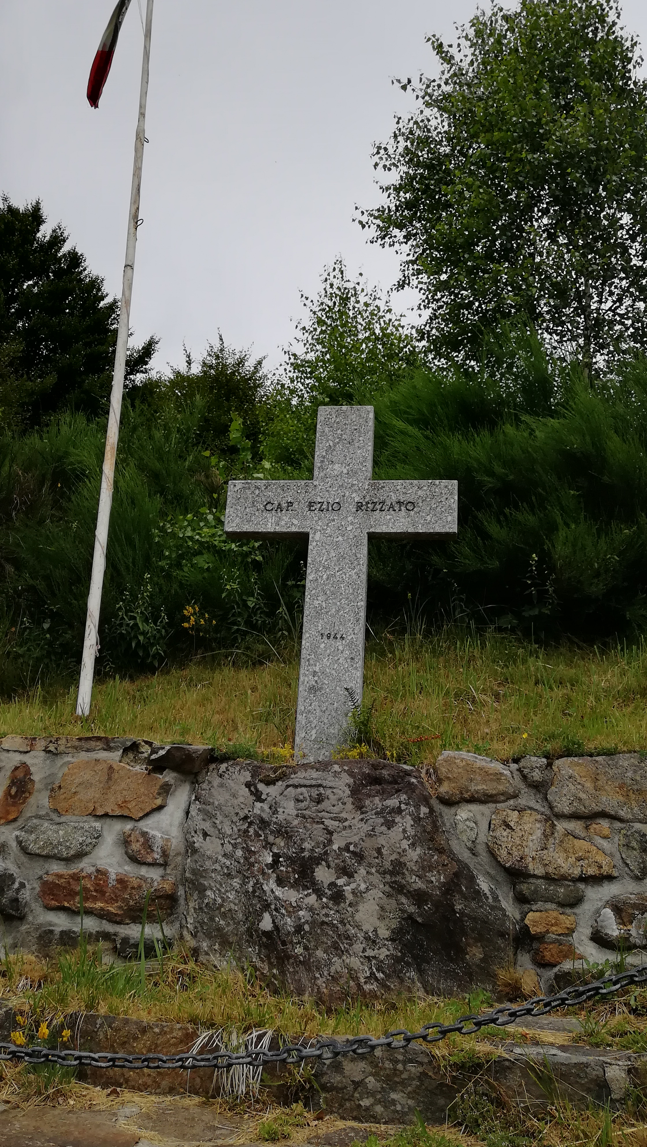 A monument for Cap. Ezio Rizzato in Monte Vecchio / Cursolo-Orasso